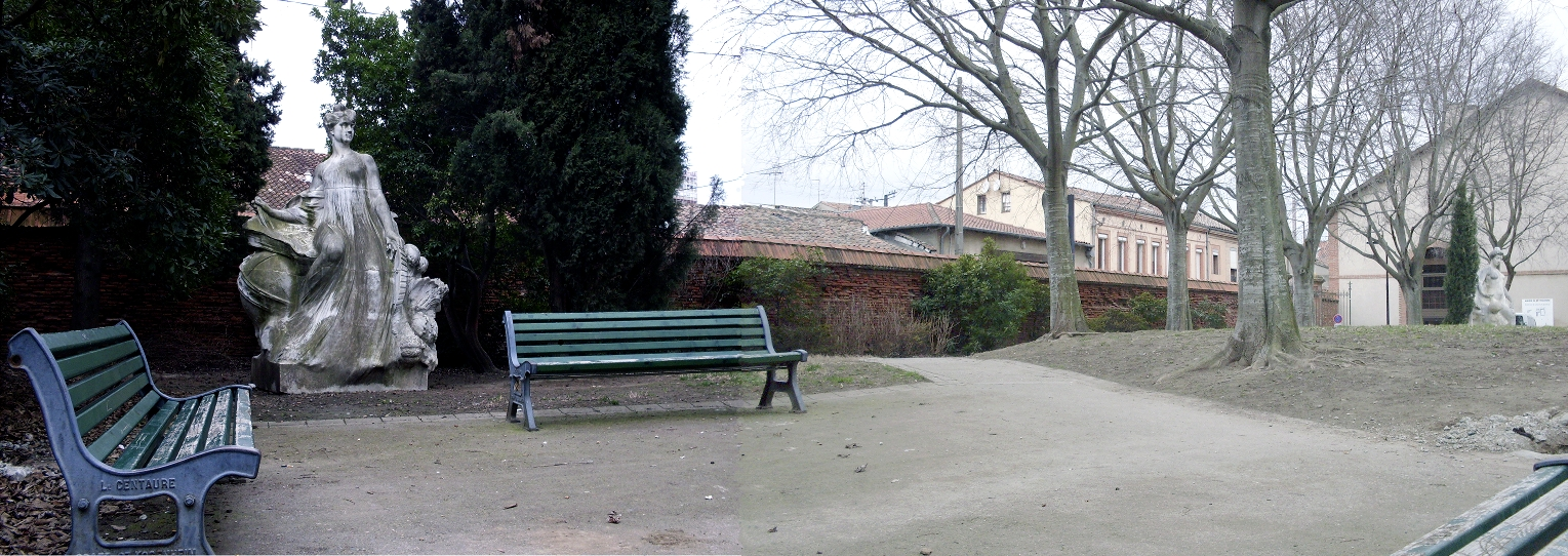 Le parc Michelet derrière l'Espace Bonnefoy à Toulouse. Panorama avec les sculptures Le faubourg Matabiau par Léo Laporte-Blairsy (à gauche) etL'eau par Jean Carlus (à droite).